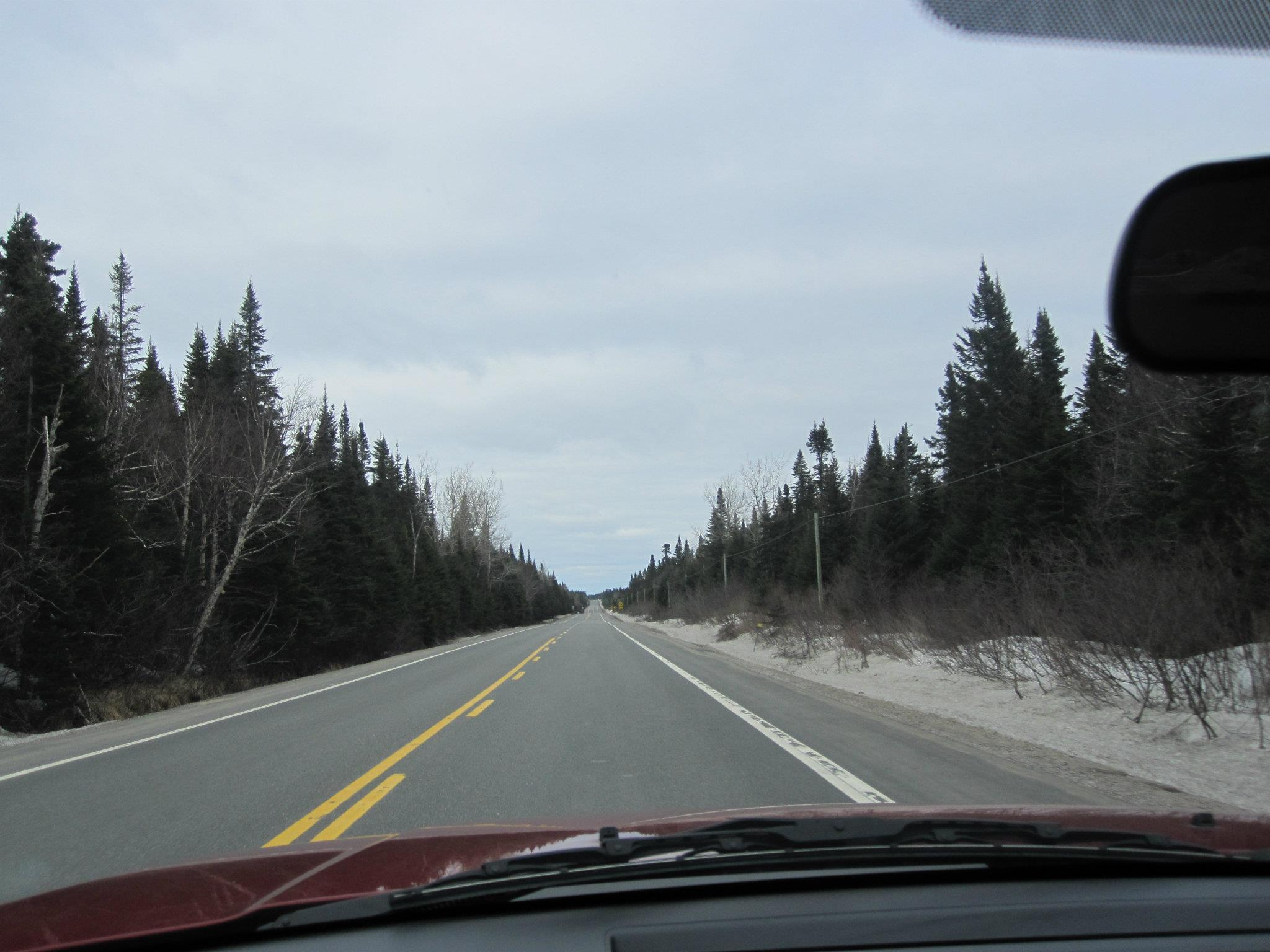 La 138 dans Bestiamites